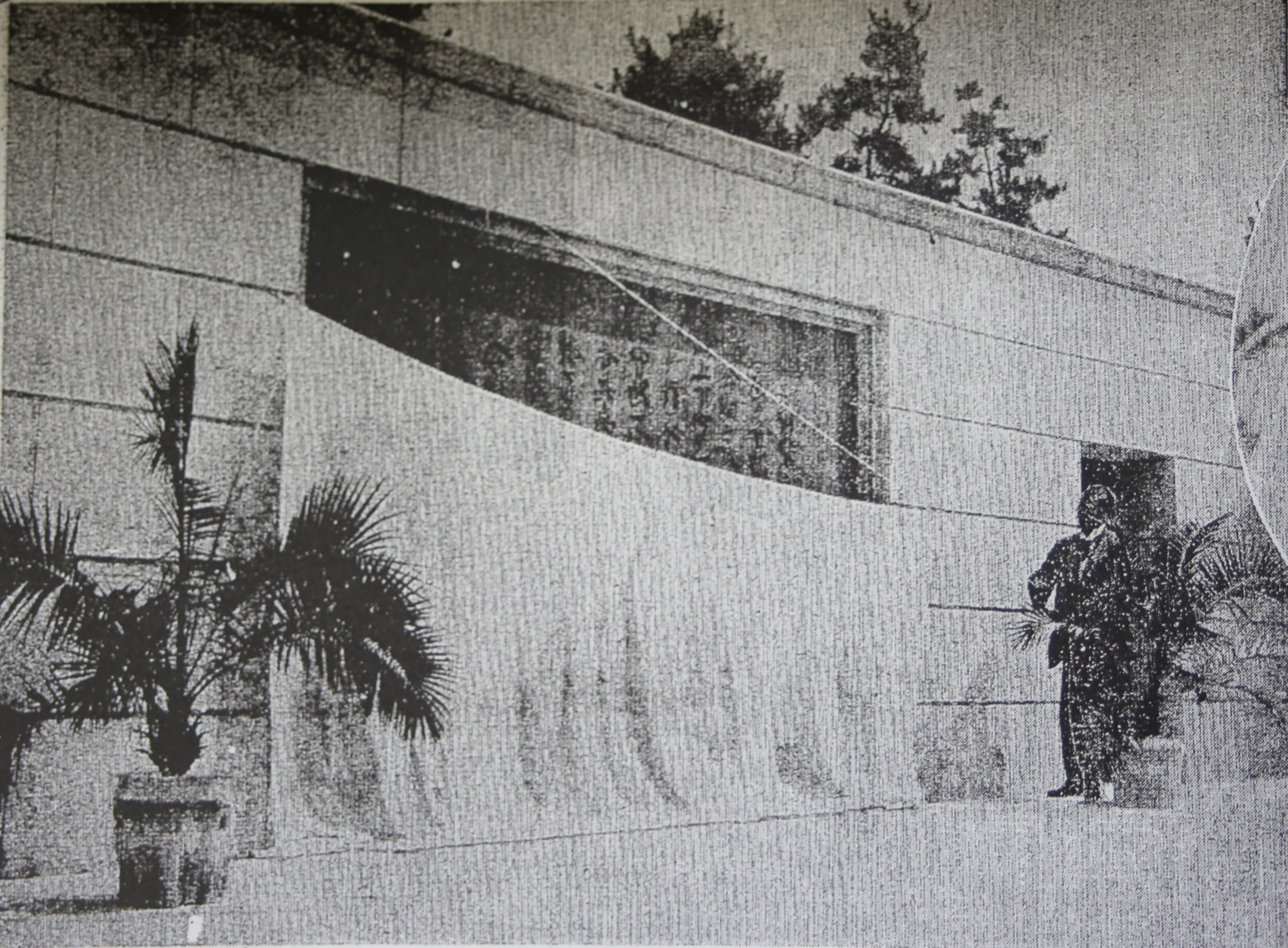 鶴舞公園内に名古屋新聞社が寄付した普選記念壇の除幕式の様子を写した報道写真